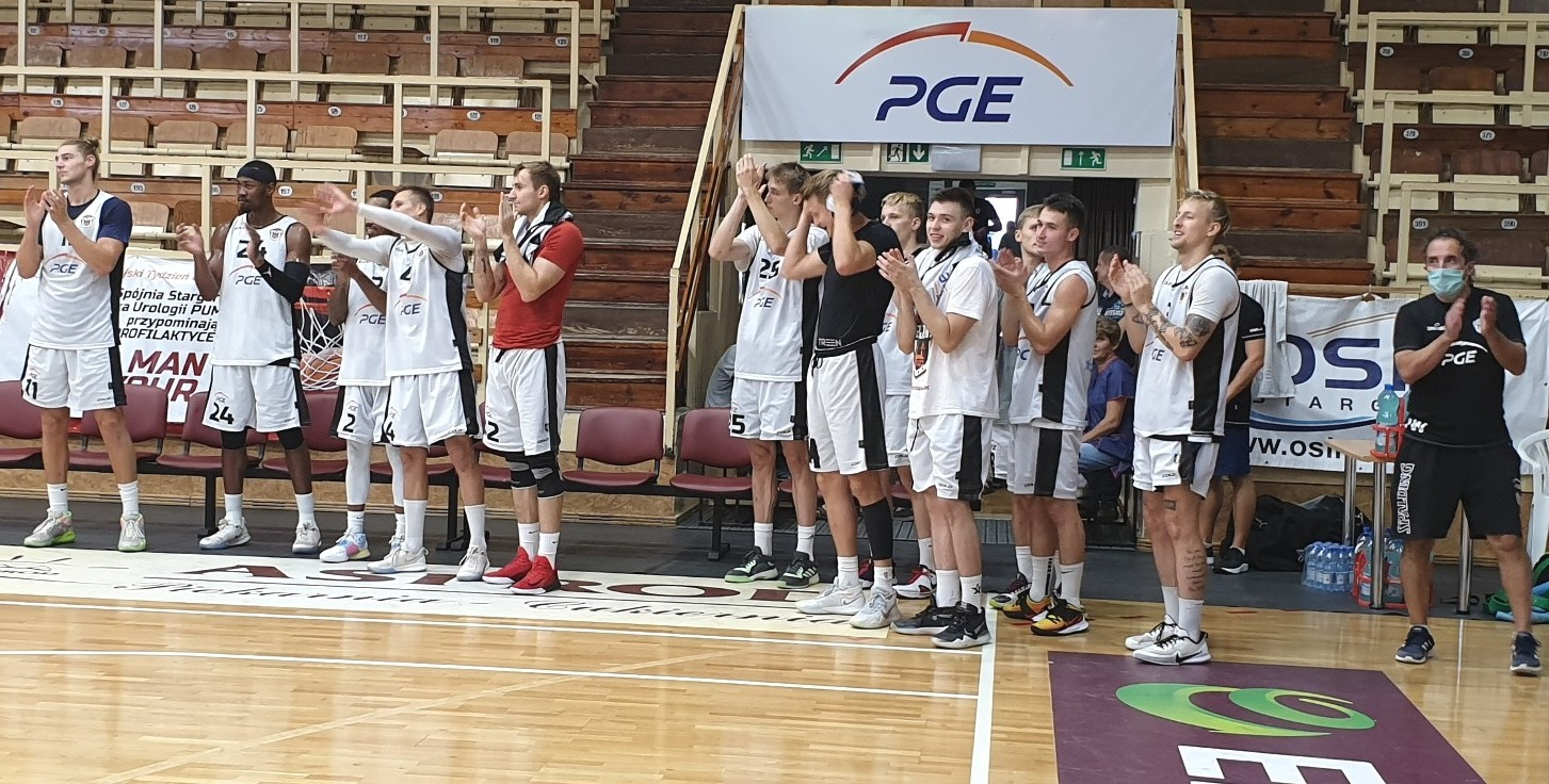 Stargard, 08.08.2020. PGE Spójnia